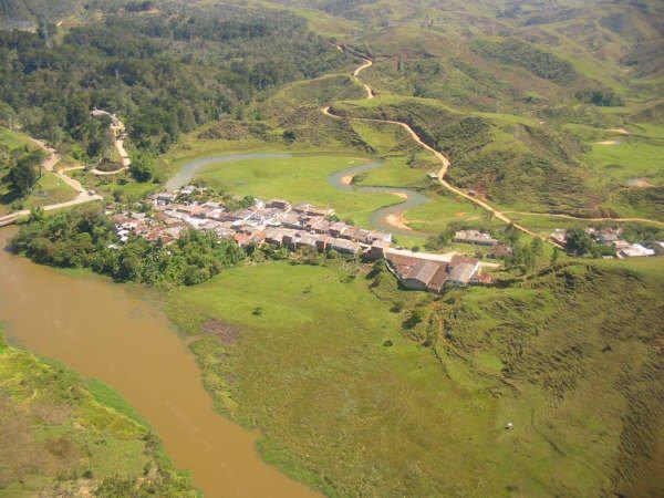 Vista aérea del Corregimiento El Salto, Dónde se nota la riqueza hídrica que lo rodea.